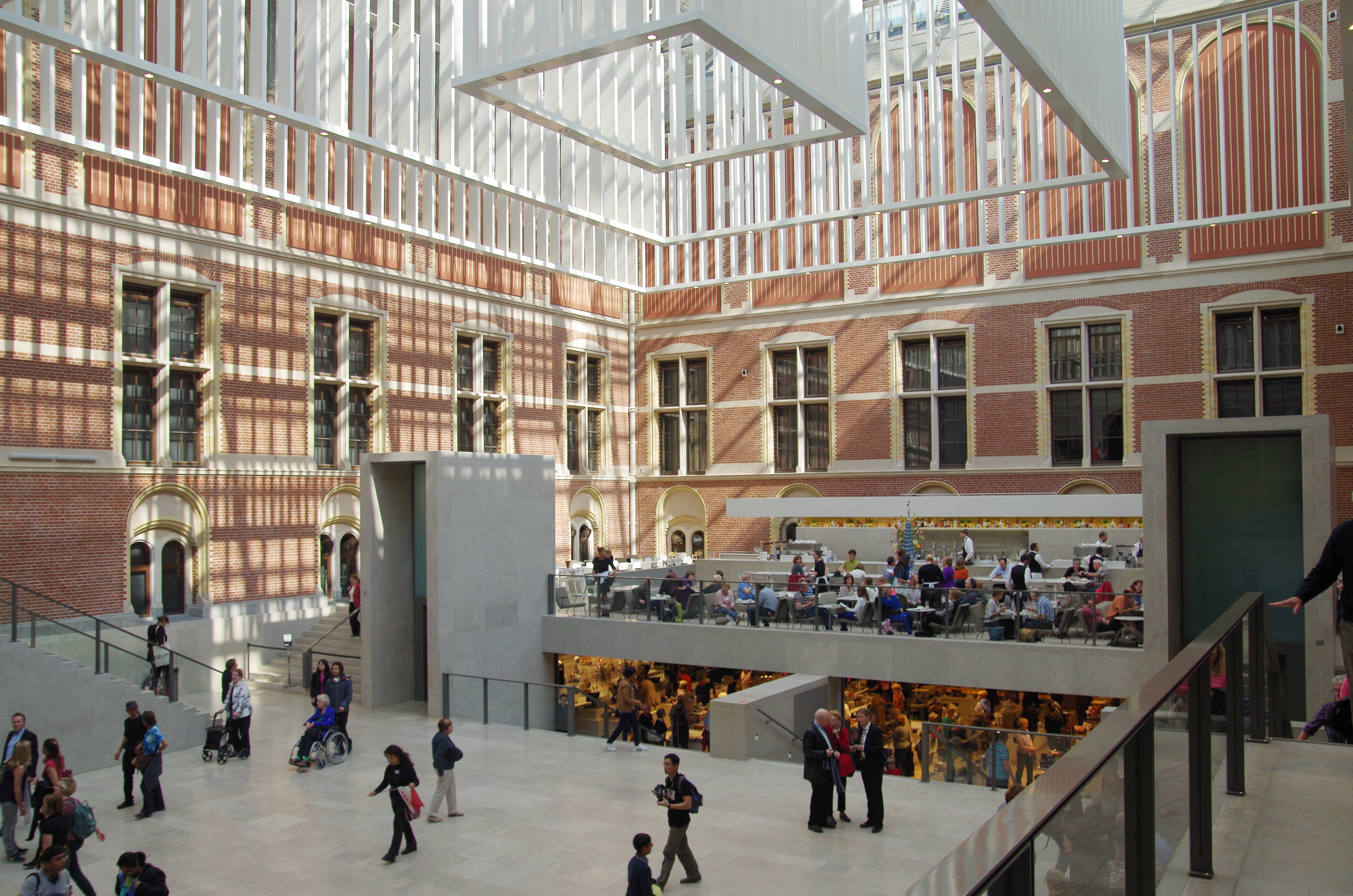 Rijksmuseum Amsterdam Innen Blick Cafe und Museumsshop